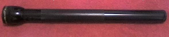 Imagem de coleçao propria, obtida atraves de camera, nao retirado da web.obtido atraves de fotos de acervo da minha coleçao e gentilmente cedidas para a Wikipedia por mim mesmo e estando livre para qualquer finalidade ligada ao uso de coleçao ou simpatia a mesma.